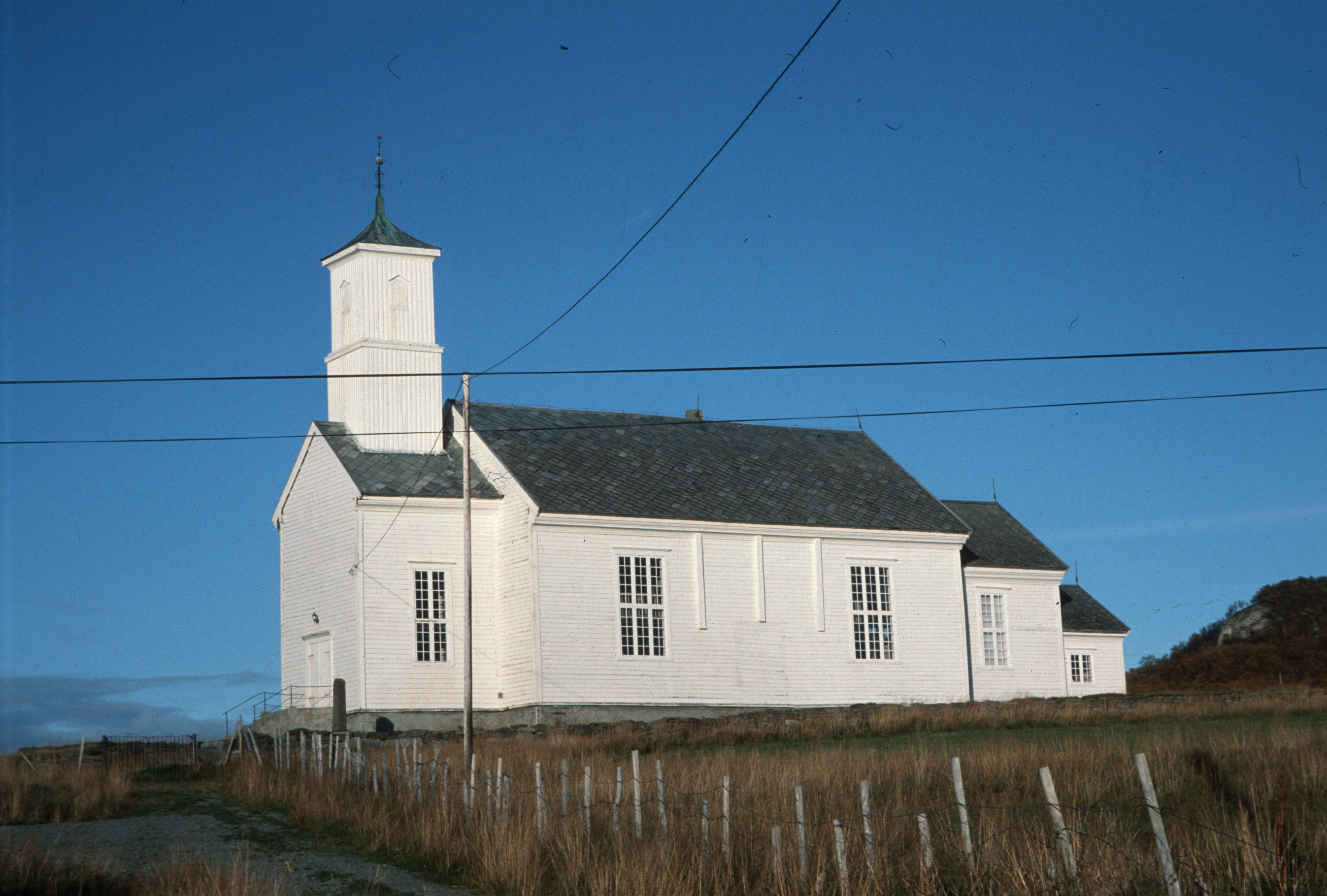 Karlsøy kirke. Foto: Ingrid Djupeal. Fra Riksantikvarens Kulturminnesøk.